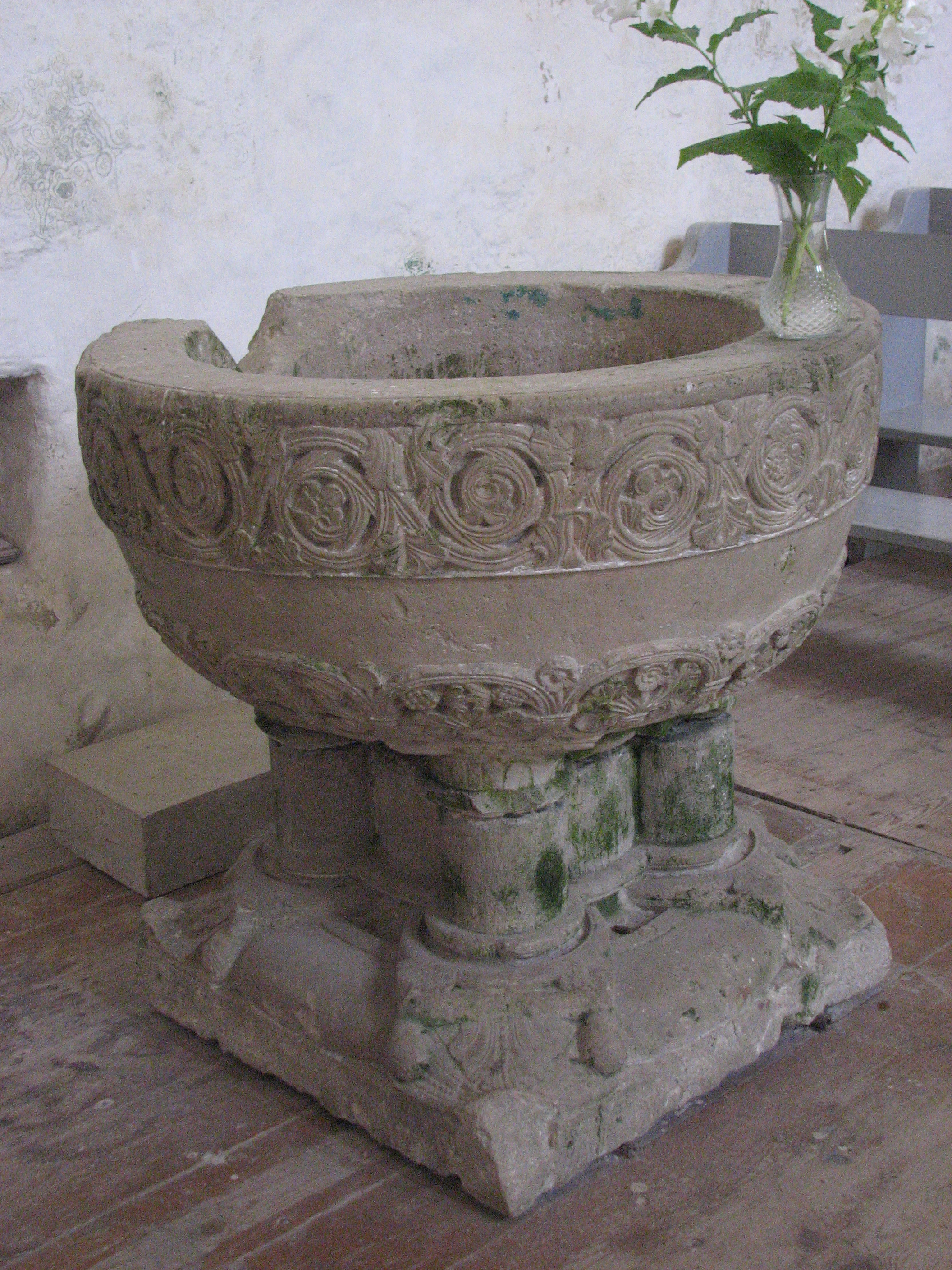 Ristimiskivi Valjala kirikus